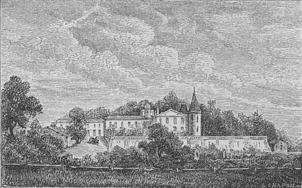 Illustration du Château Lafite dans l'ouvrage Bordeaux et ses vins (6ème édition) de Charles Cocks et Edouard Féret publié en 1893